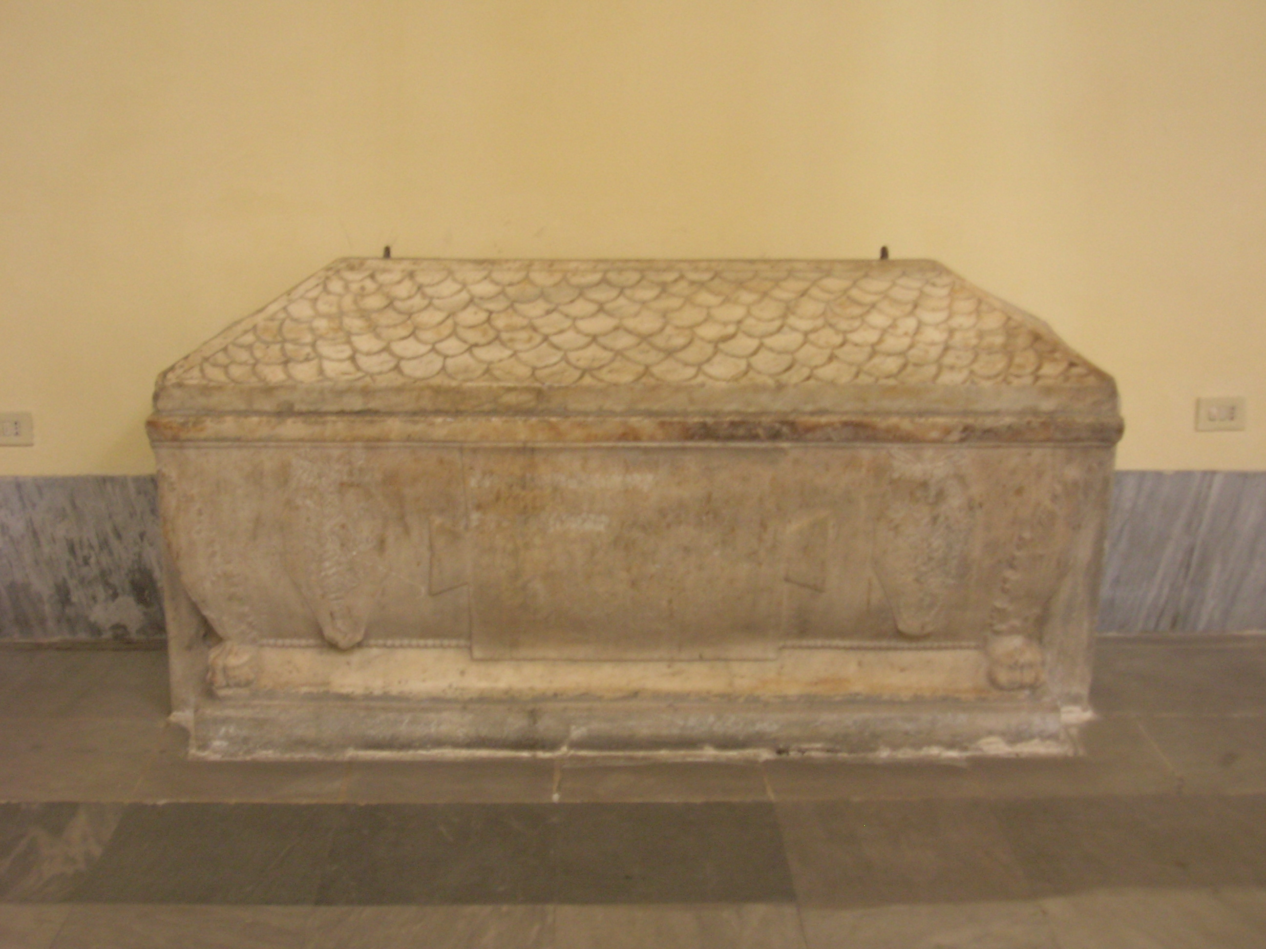 La Spezia - Chiesa Abbaziale di Santa Maria - Cassa sepolcrale della Marchesa Francesca Malaspina da Mulazzo